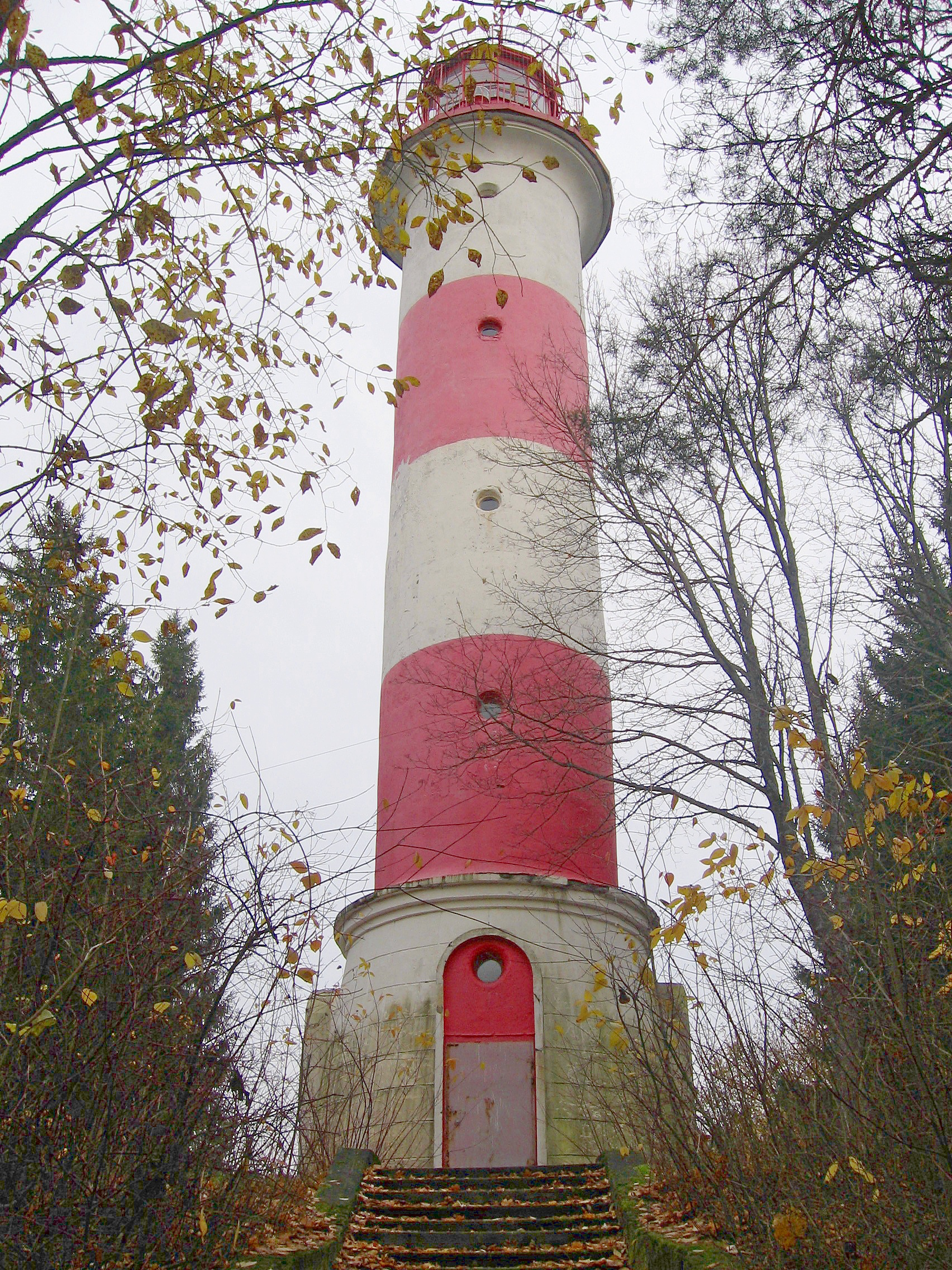 Маяк Стирсудден